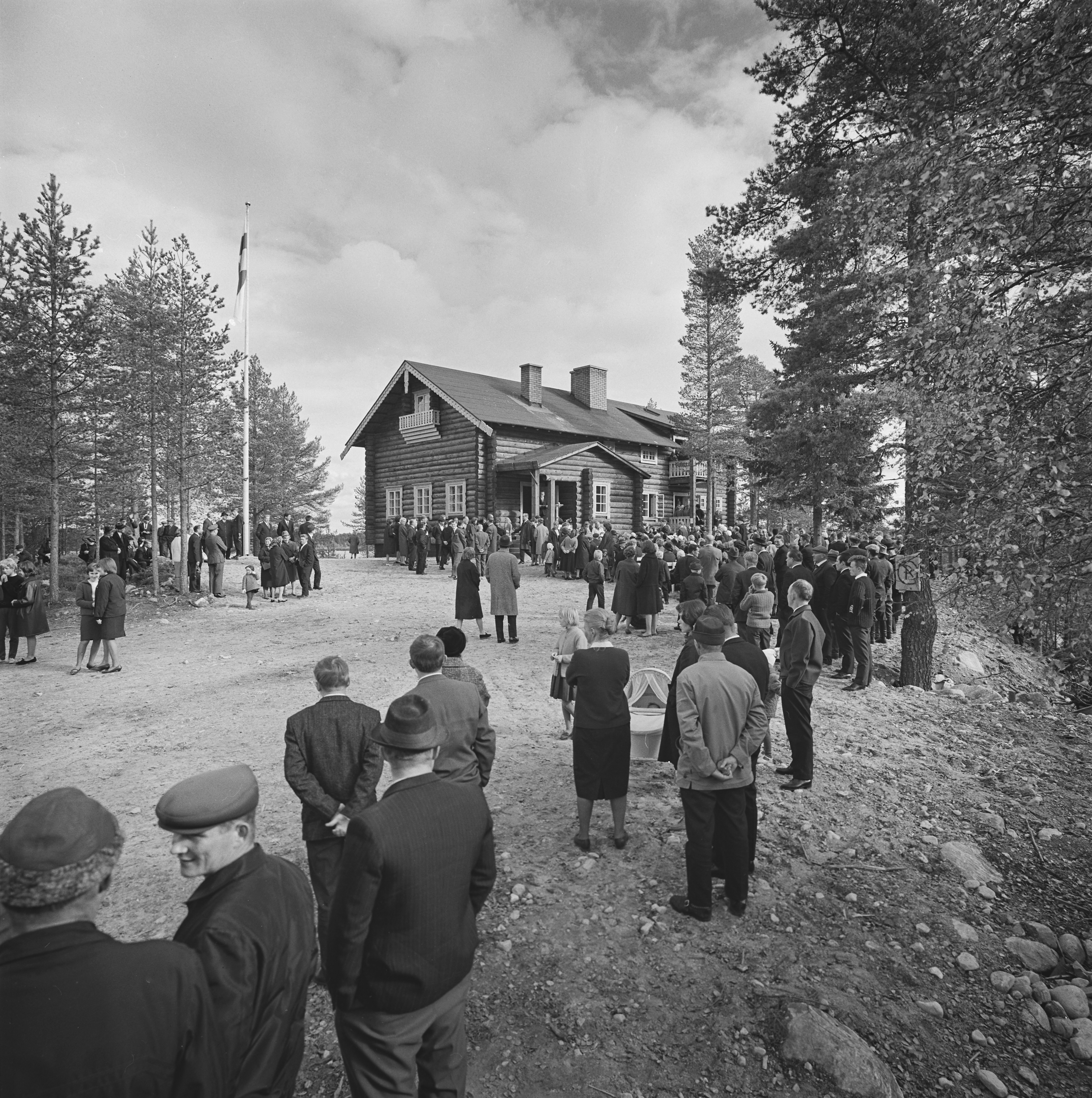 Domnan pirtin vihkiäiset Suomussalmen Kuivajärvellä